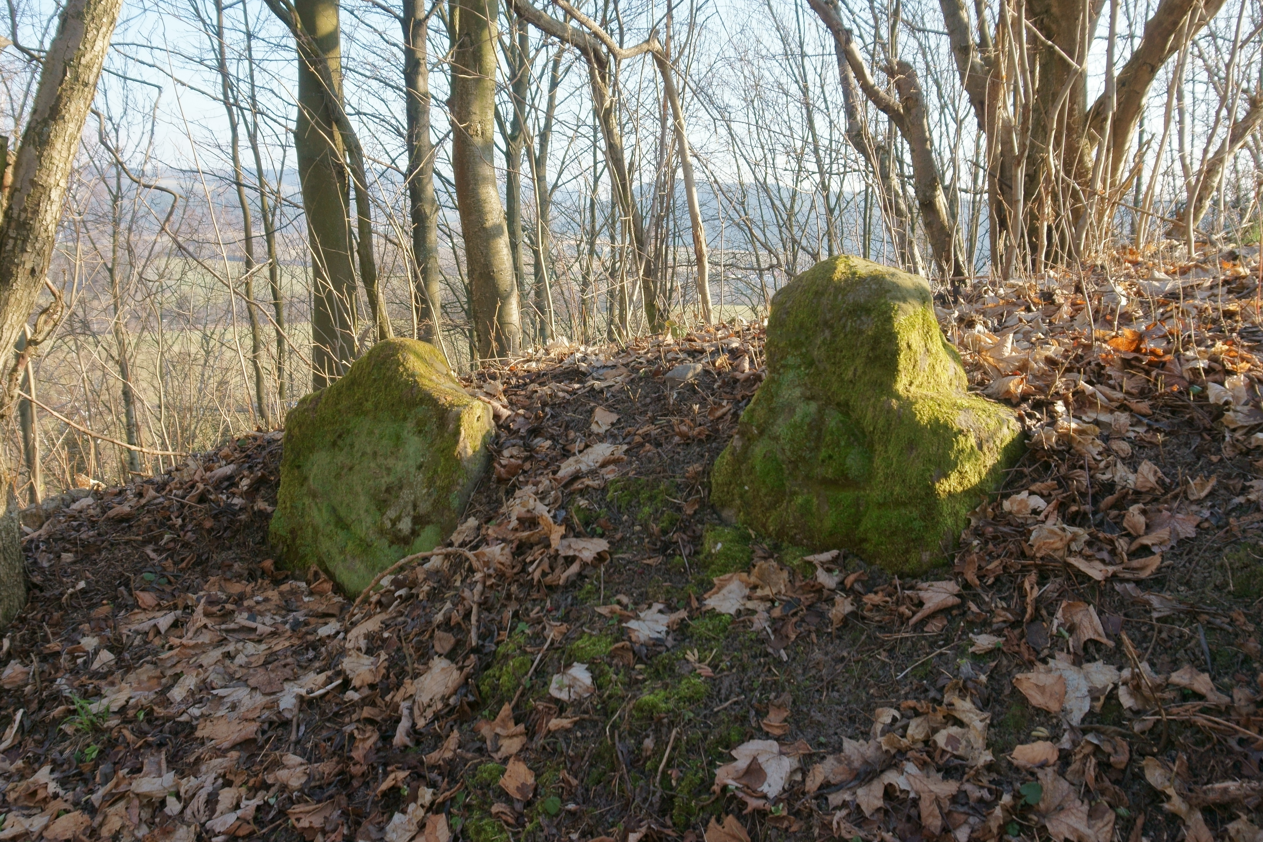 Hodkovice nad Mohelkou - brzdový kámen a smírčí kříž. U místa strmého klesání z Kostelního vrhu k Hodkovicím.